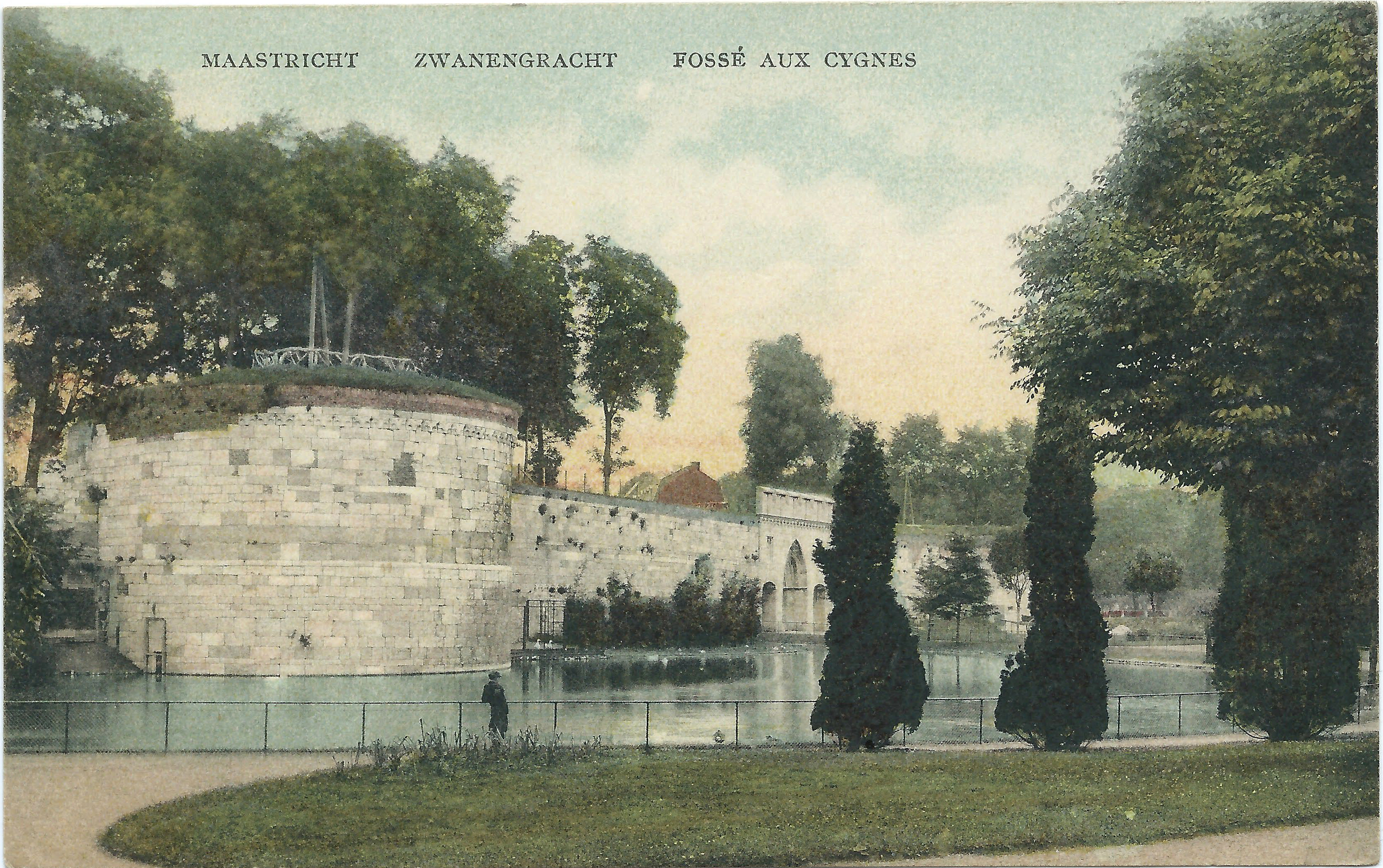 De oude grachtengordel van Maastricht die ingericht was als park en toeristische attractie zoals deze briefkaart toont.